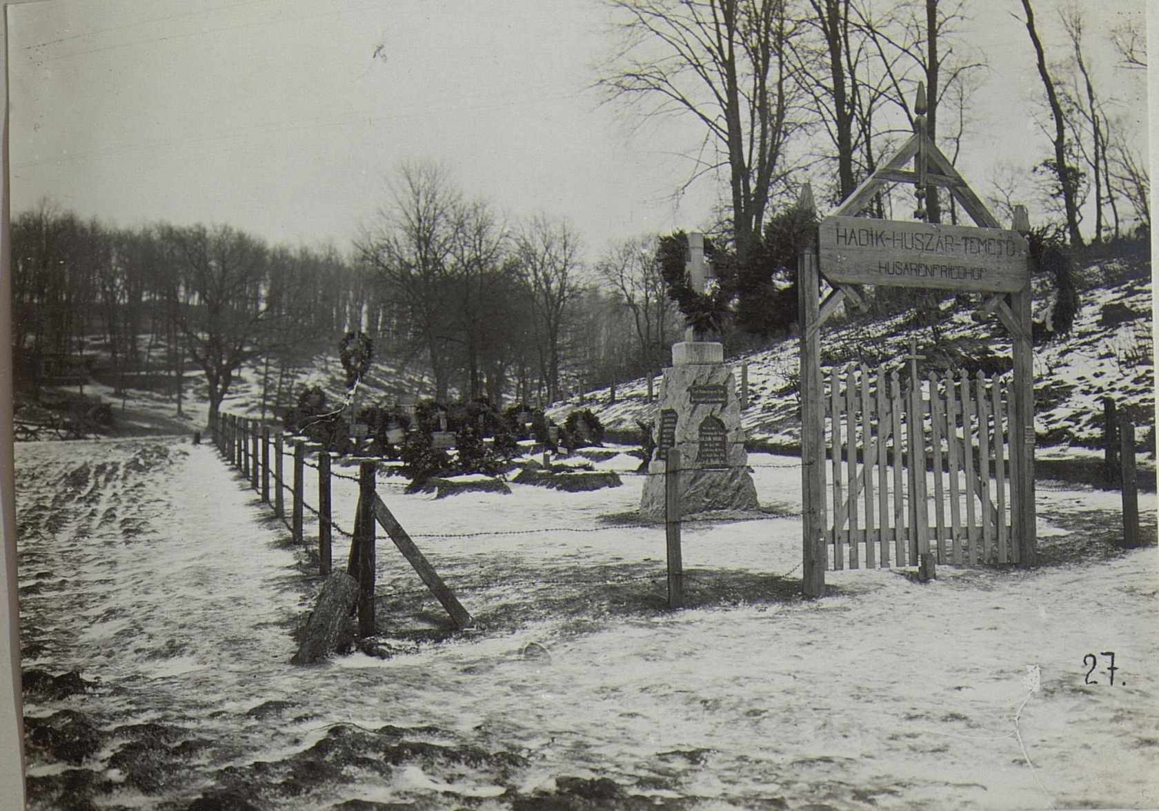 Heldenfriedhof Hadik Husaren bei Rarancze